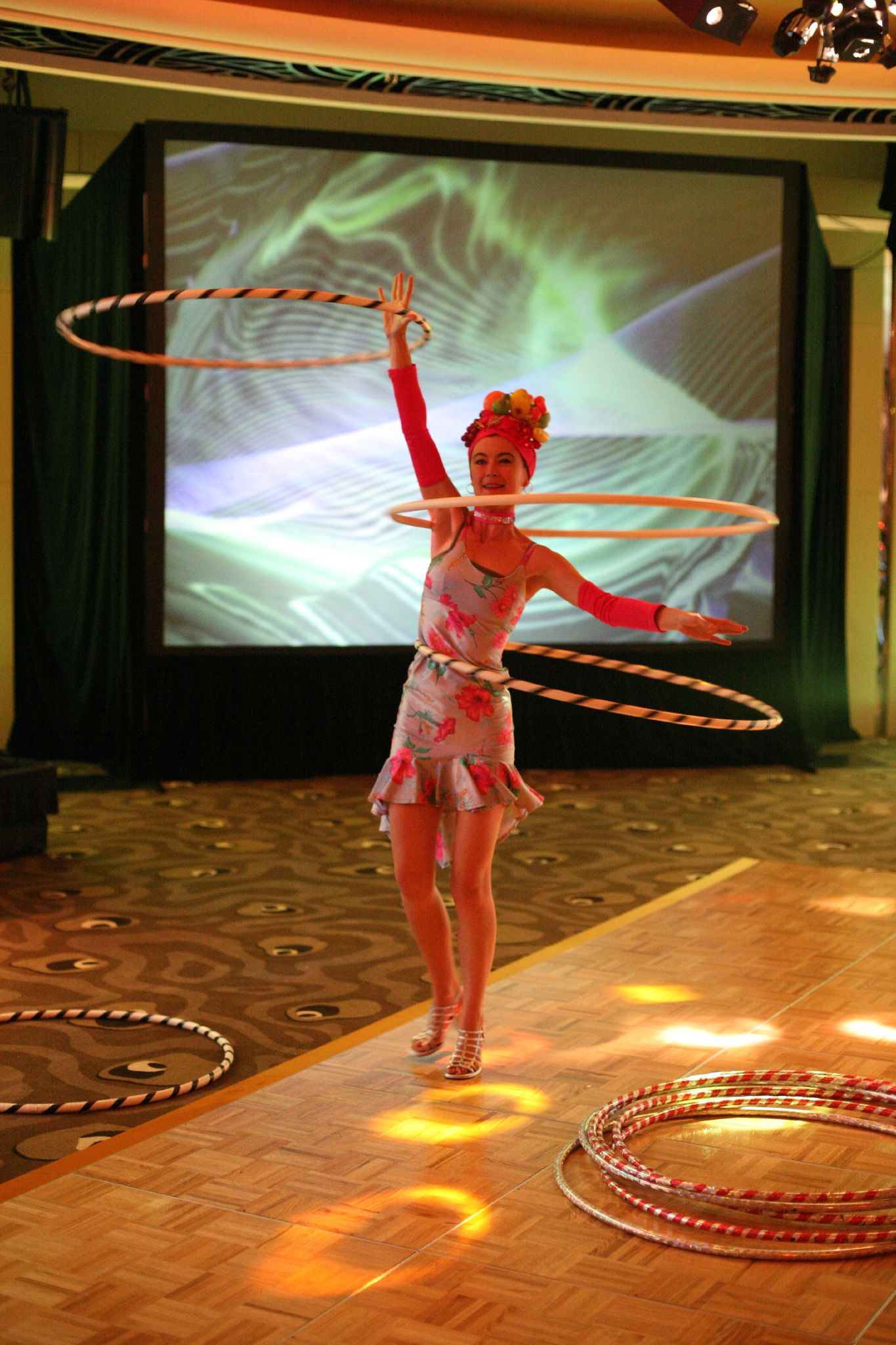 Kyra Maniac Hula hoop girl